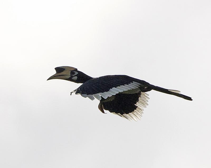 oph 690V3000